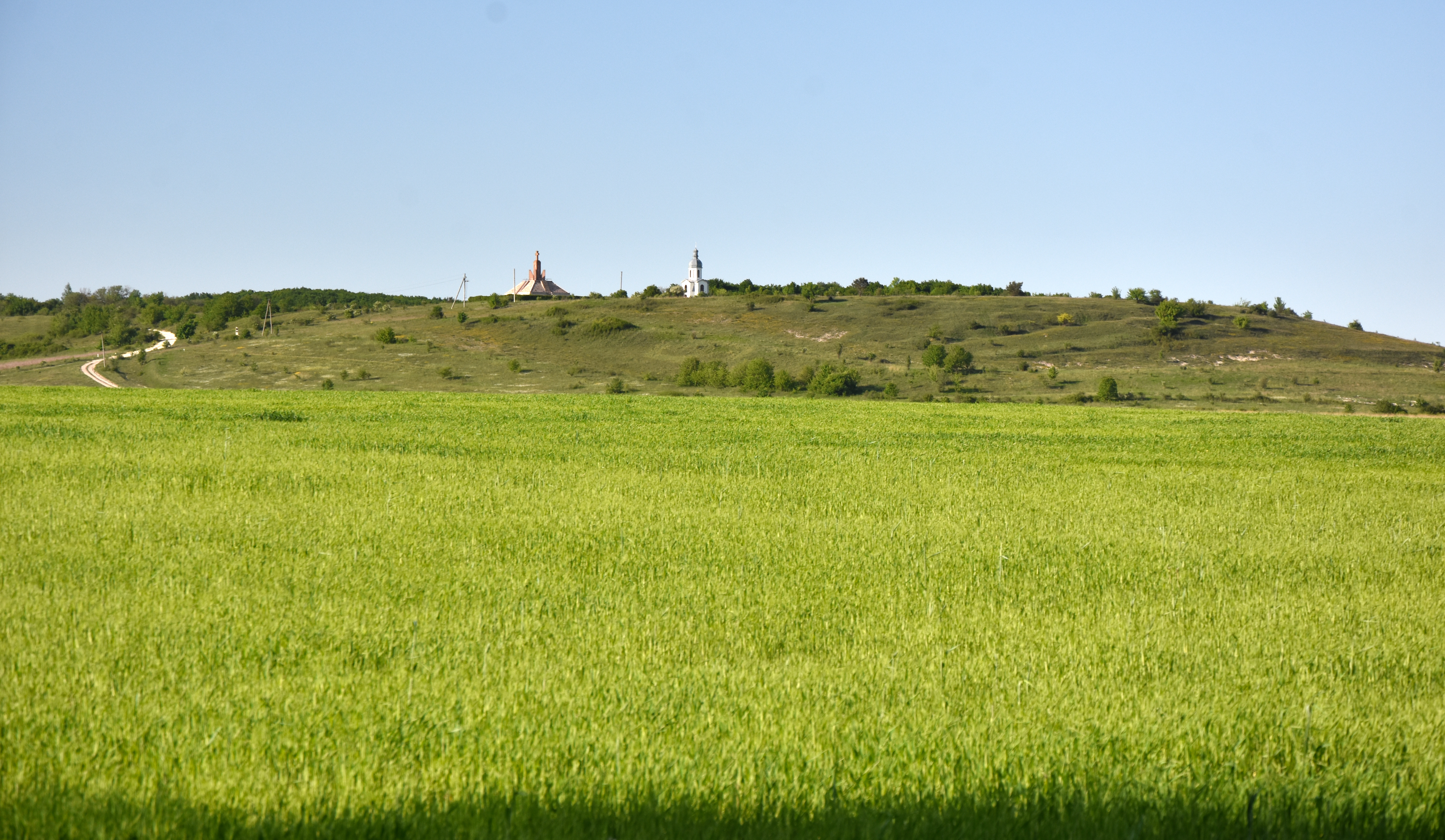 Гора «Лисоня», Бережанський район, с. Потутори, околиця села